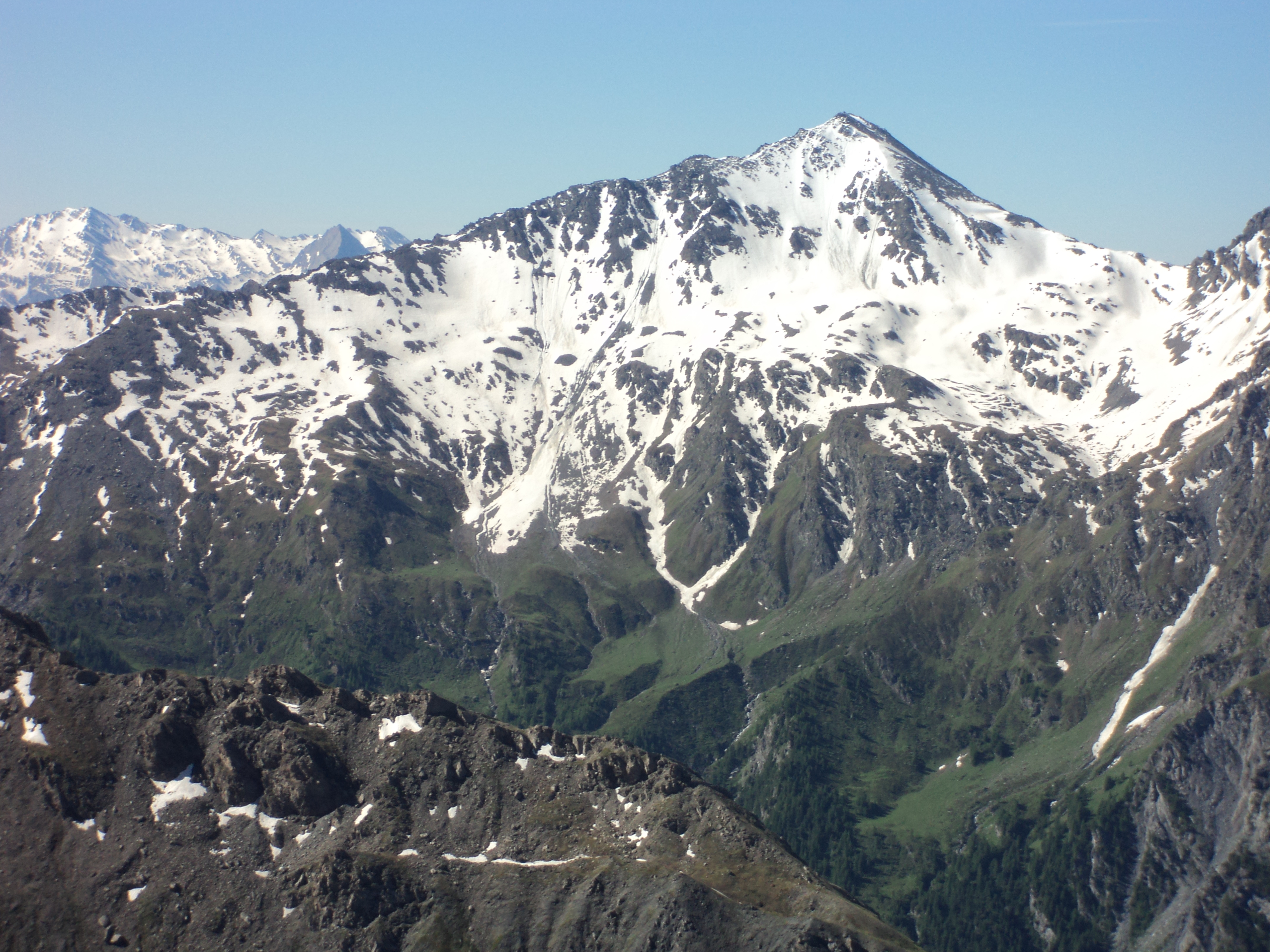 La Punta Ramiere (detta anche Bric Froid) vista dalla Rognosa di Sestriere